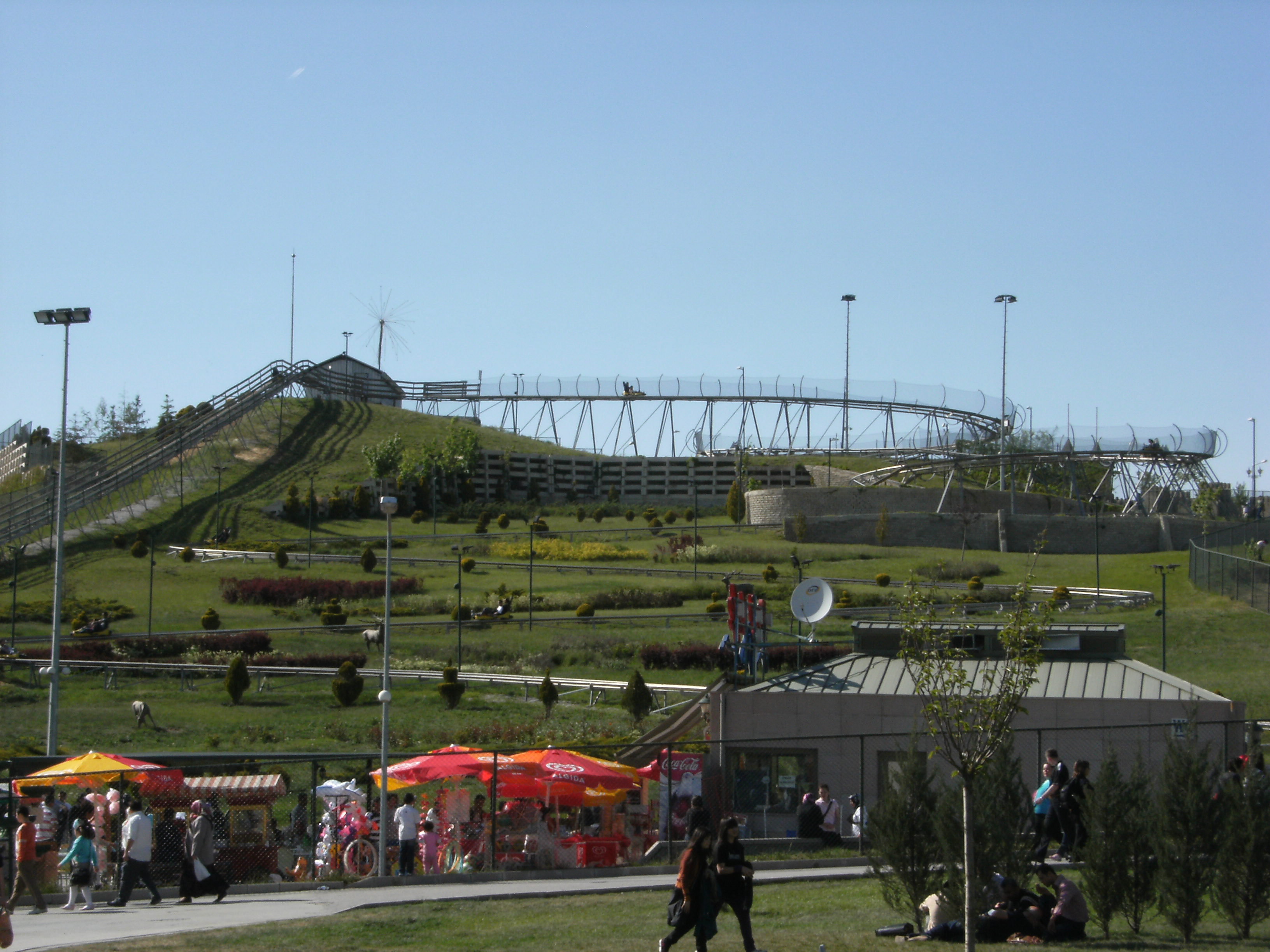 Ankara, Eryaman'da bulunan Göksu park - Dağ kızağı parkuru